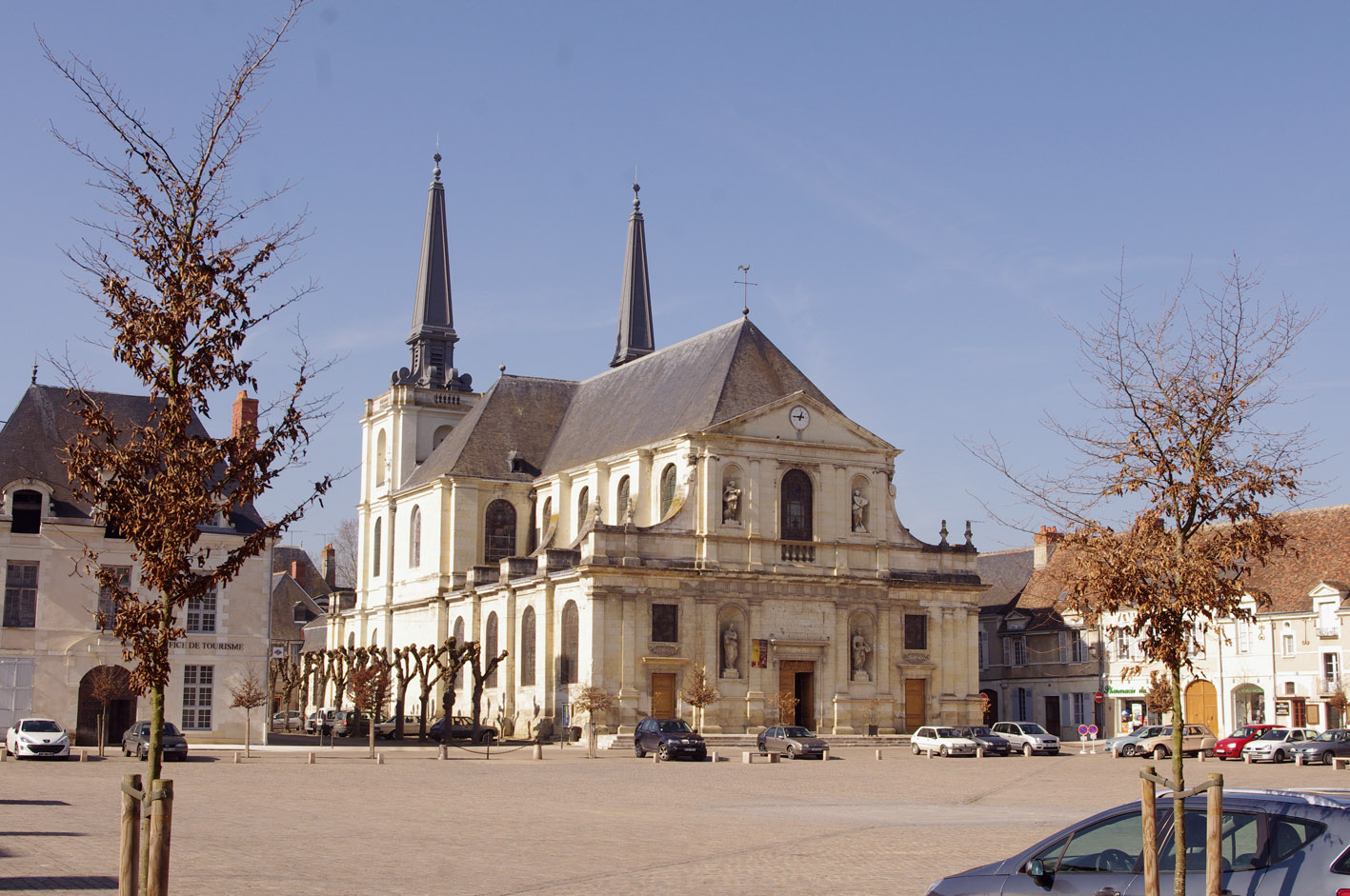 église de la ville de Richelieu, France (37), XVIIe siècle.